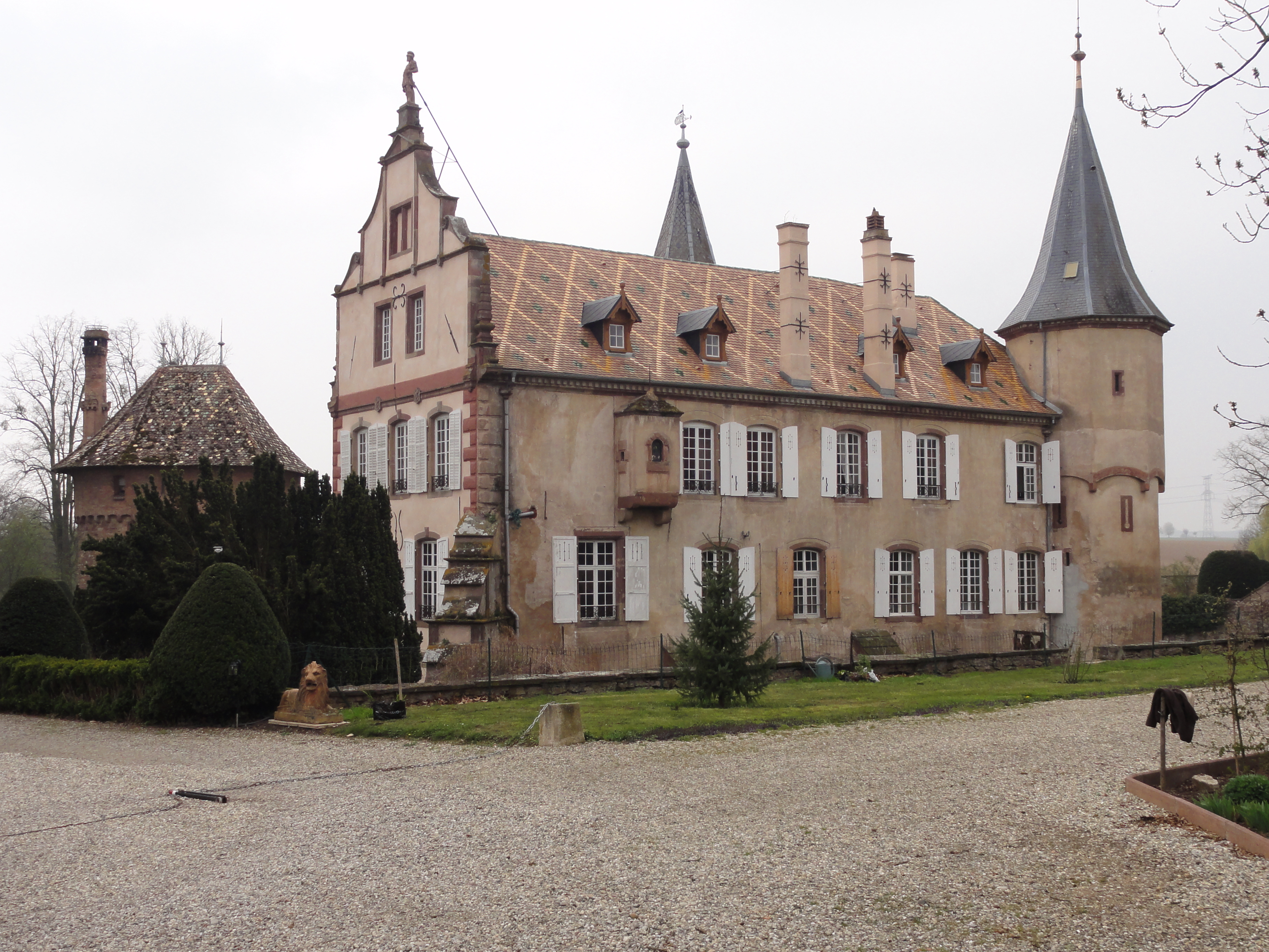 Alsace, Bas-Rhin, Osthoffen, Château (XVIe-XIXe) (PA00084877, IA67005654).